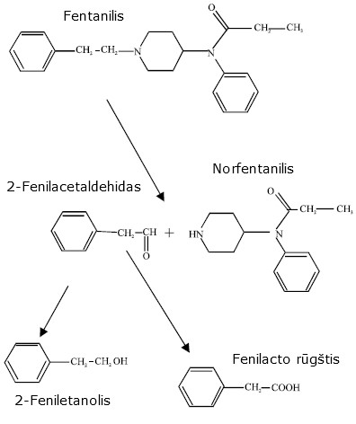 Fentanilio metabolinis žemėlapis